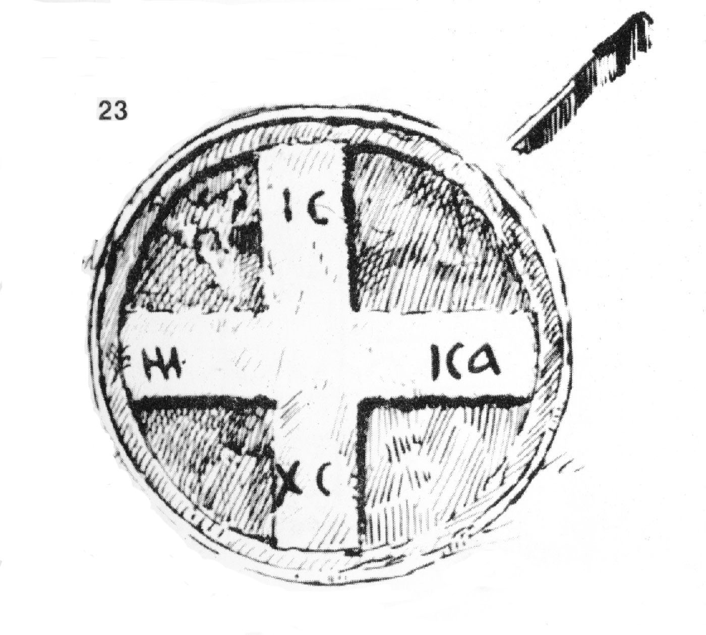 23. Кръст - релеф върху паметния надпис из с. Въл­чедръм, Ломско. Четирикрилен: с вензелите . Четирикрилен в кръг. Груба изработка върху песъчлив сив камък - блок-плоча. Размери: 72 см в диаметър. Скициран на 23.I.1923 г. По оригинала в Народния музей. (Т. 11, обр, 85. }